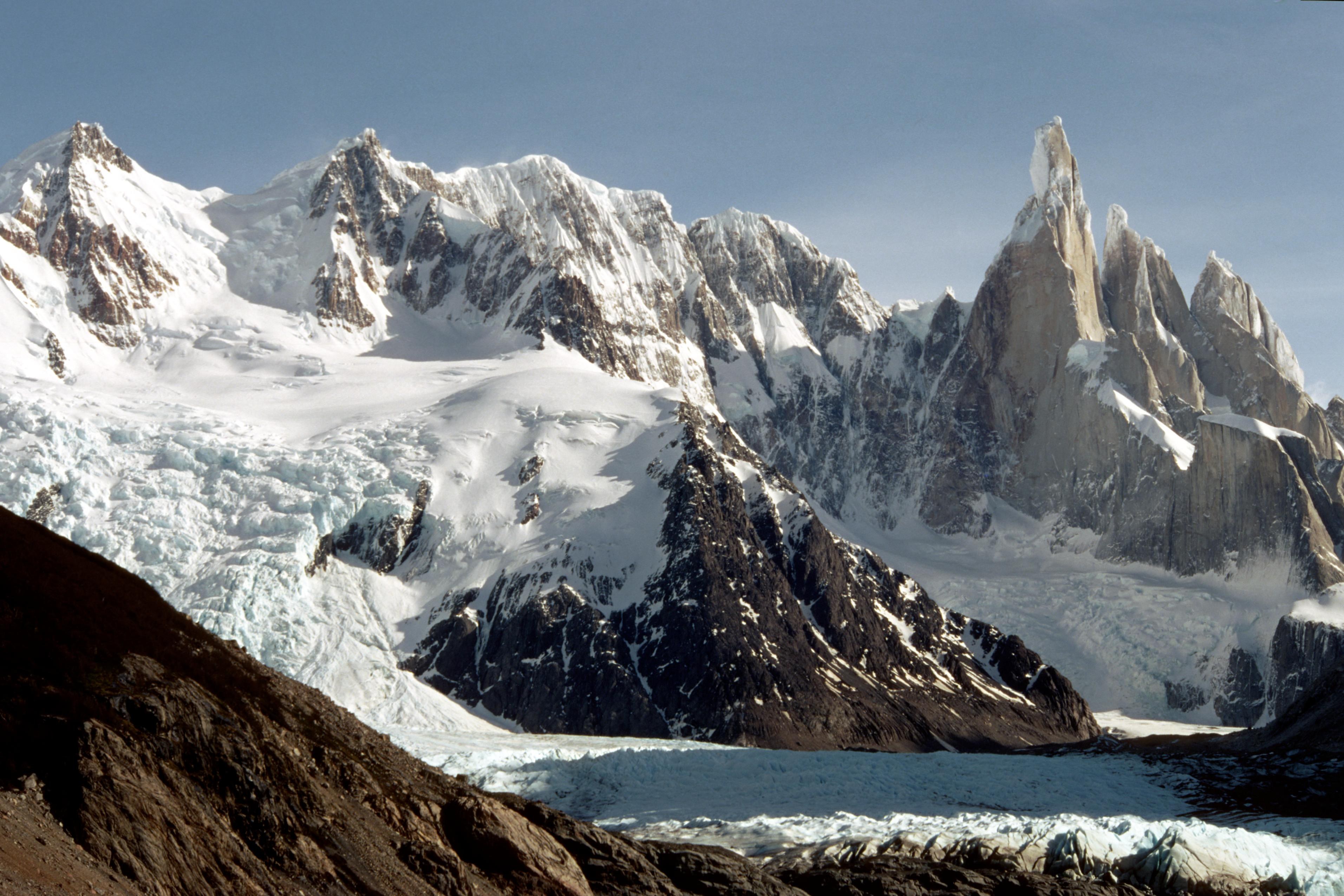 Cerro Torre, Patagonia - ARGENTINA